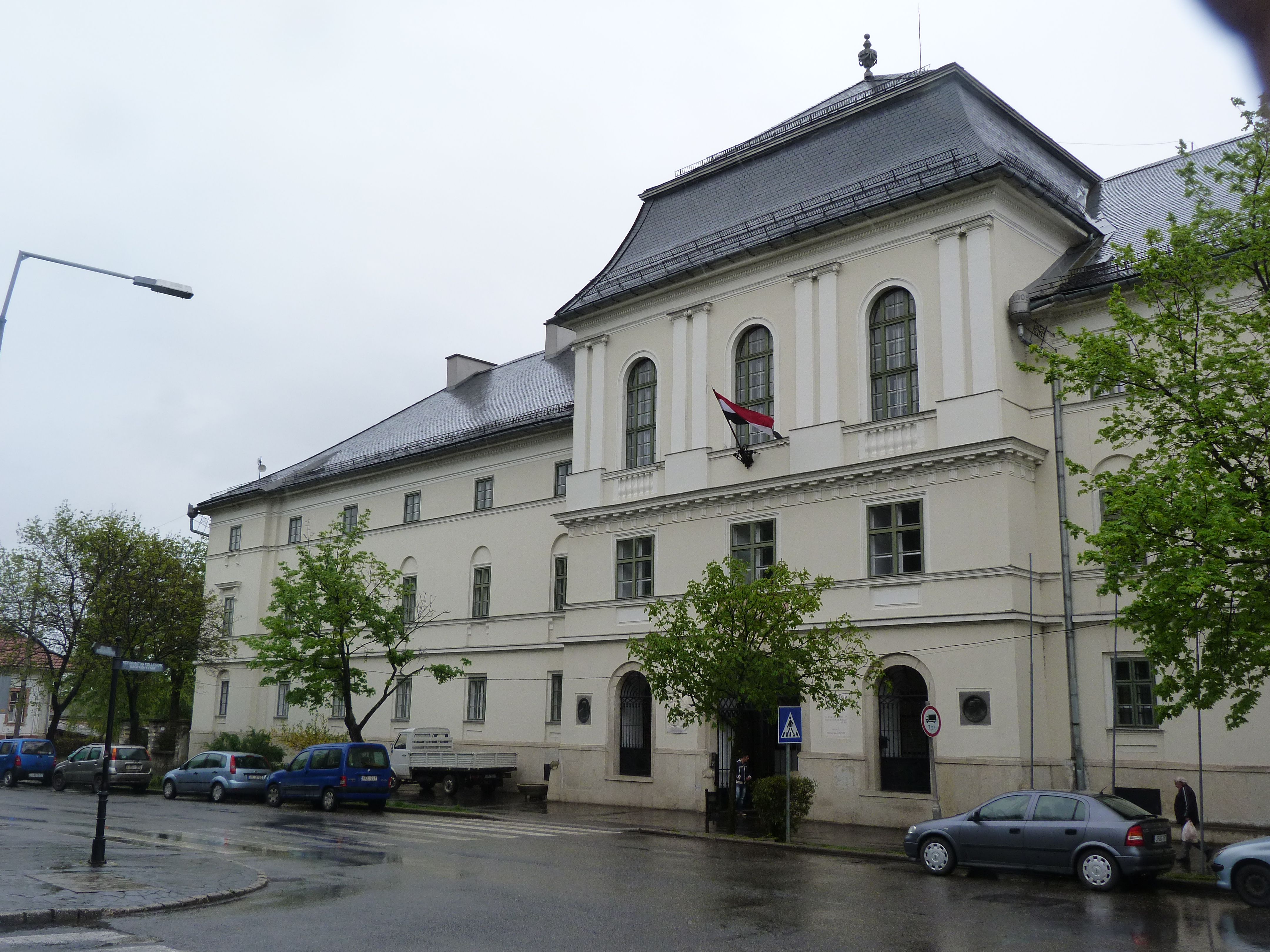 A felvétel 2014. április 9 –én, szerdán készült Sárospatakon. Sárospataki Református Kollégium Könyvtára, Iskola Múzeum. ©© Derzsi Elekes Andor, Budapest, 2014, A kép és filmfelvételek egészben, vagy részletekben másolását, bármilyen úton történő sokszorosítását és felhasználását a szerző ellenérték nélkül, jogutódjaira is kihatóan megengedi. Az engedély kiterjed a kereskedelmi célú hasznosításra is. Kéri azonban nevének feltüntetését a felhasználás során. A Metapolisz sorozat valamennyi képe és filmje Creative Commons alatti valamint kereskedelmi - for profit - célra is felhasználható. Ajánlott hivatkozás: Derzsi Elekes Andor: Metapolisz DVD line